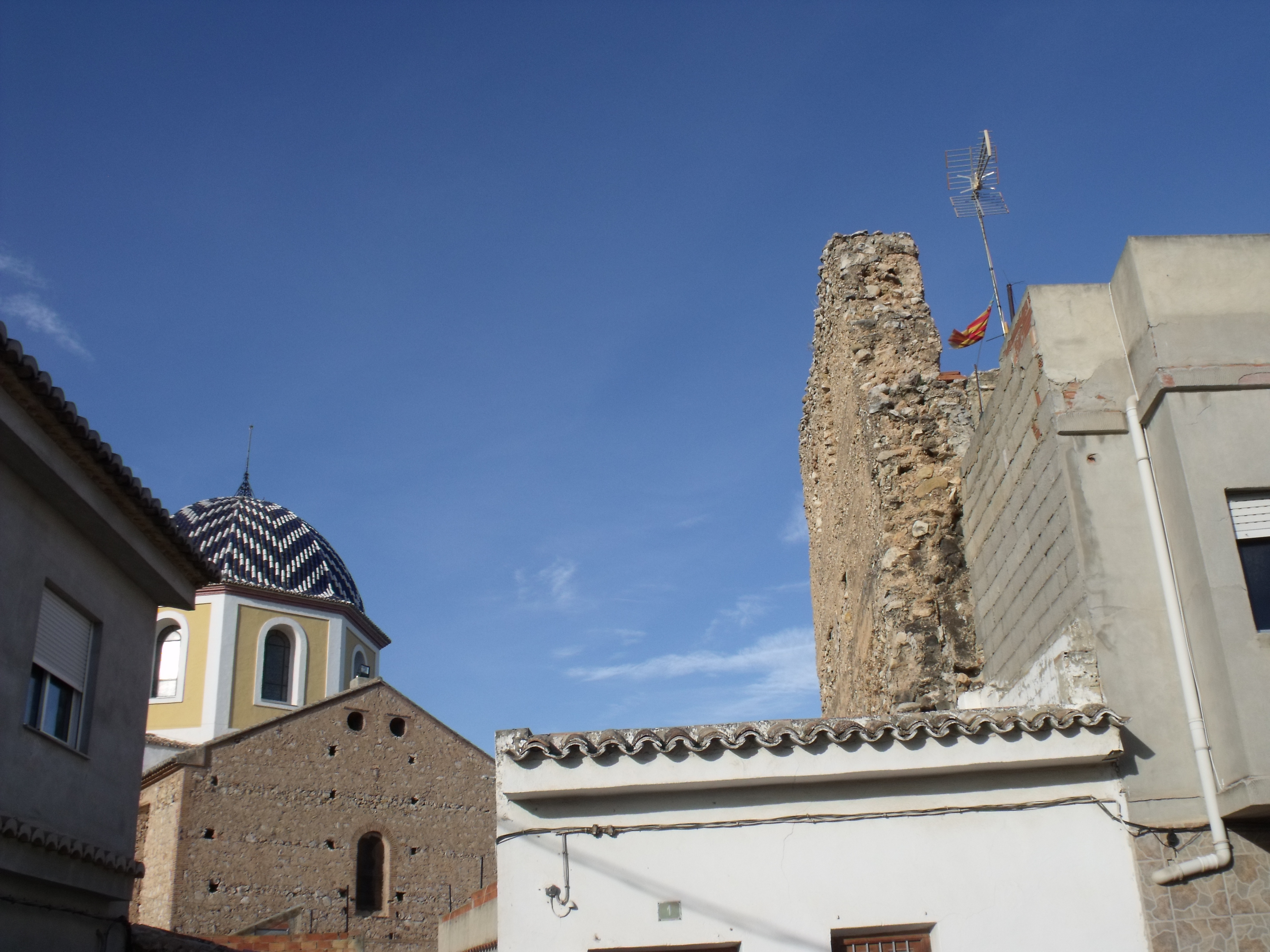 Villamarchante: castillo e iglesia.